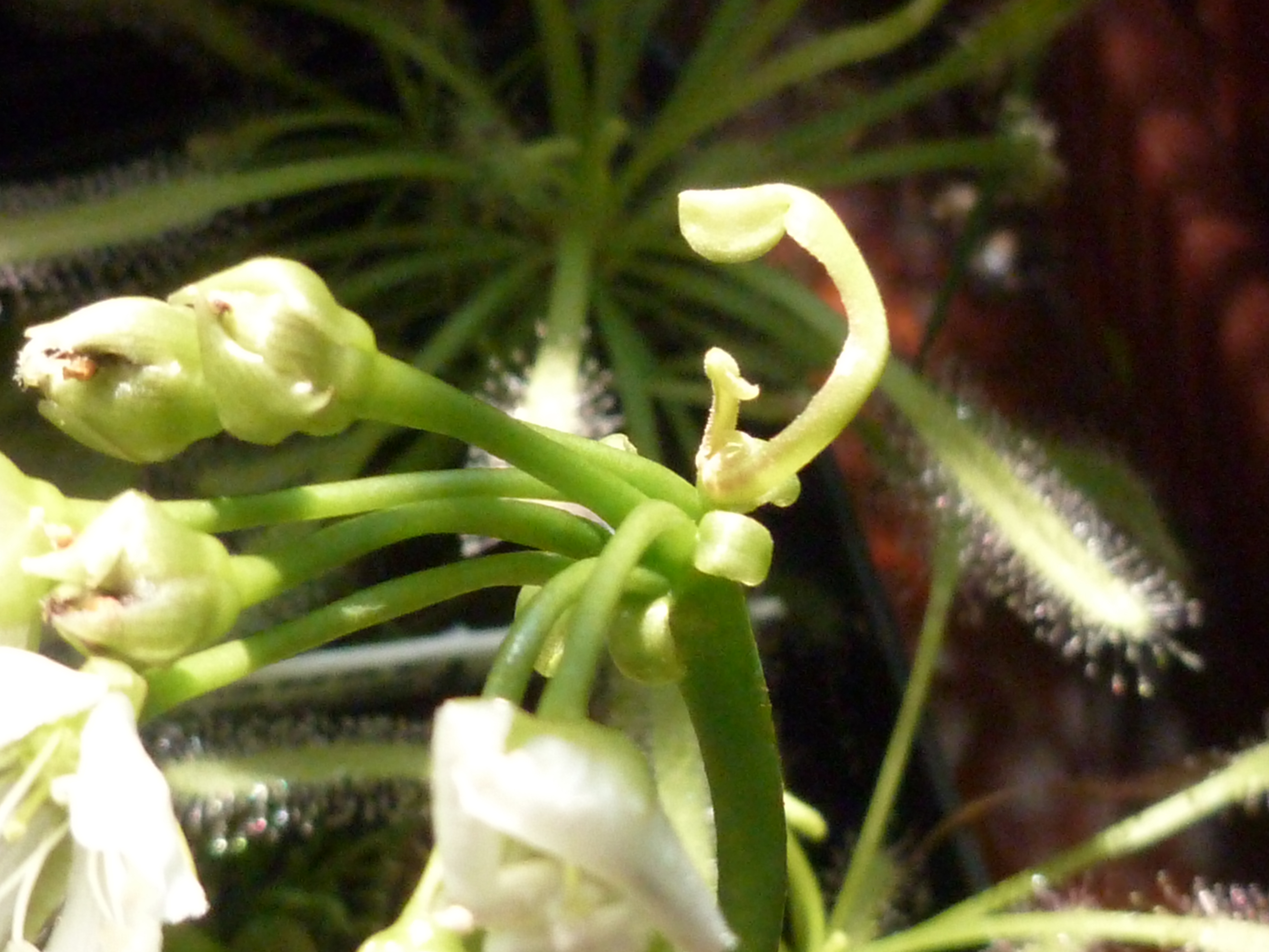 Observation de "pseudo-viviparite" sur une hampe florale de Dionaea muscipula